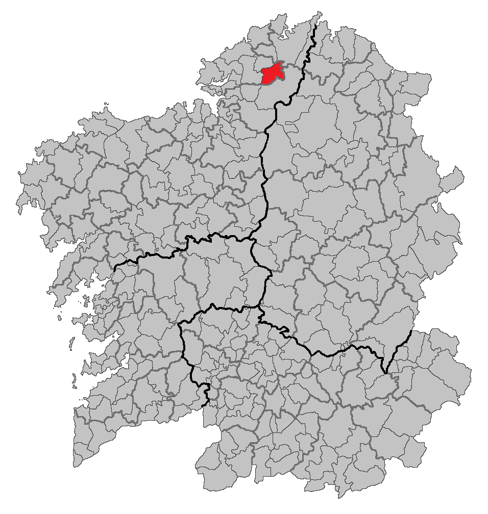 Mapa coa localización do concello de As Somozas.